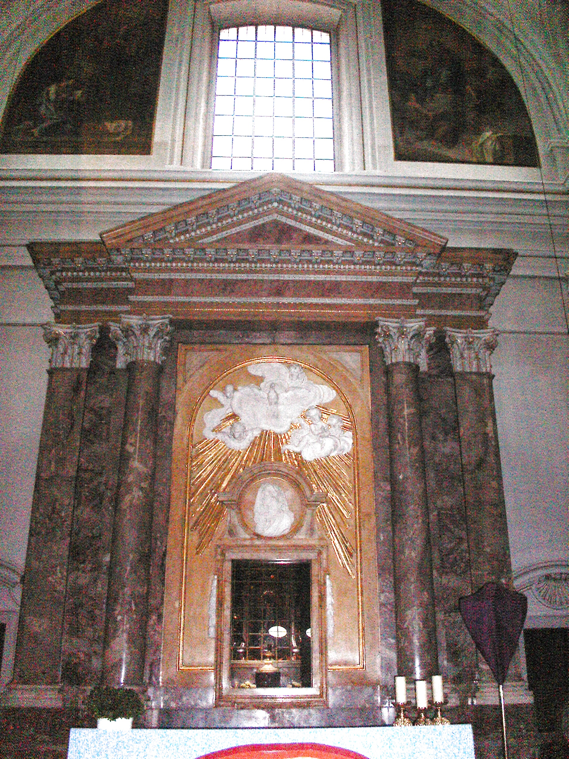 Wallfahrtskirche Ludwigshafen Oggersheim